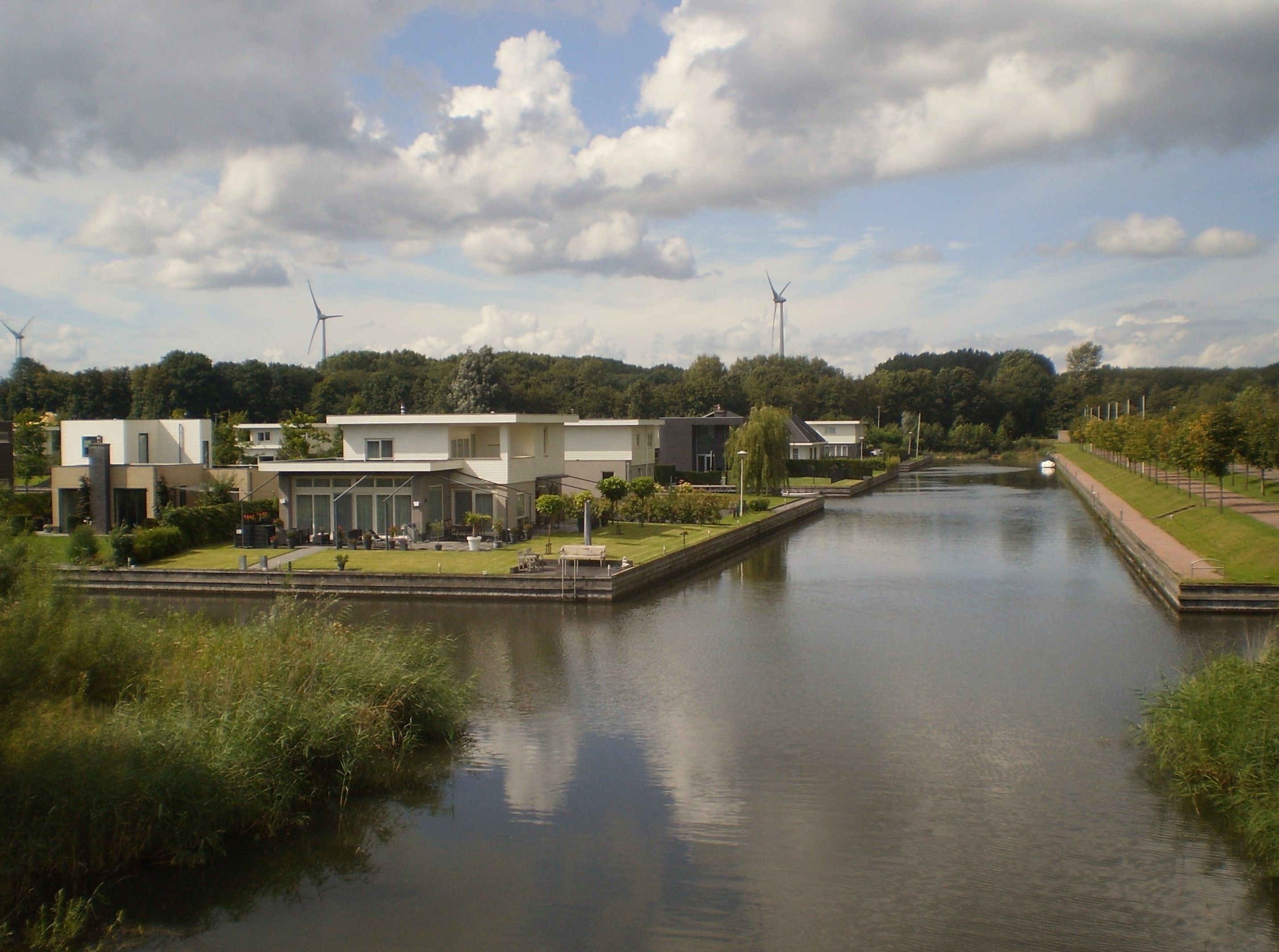 Vakantiepark 'Harderwold', gemeente Zeewolde (NL)